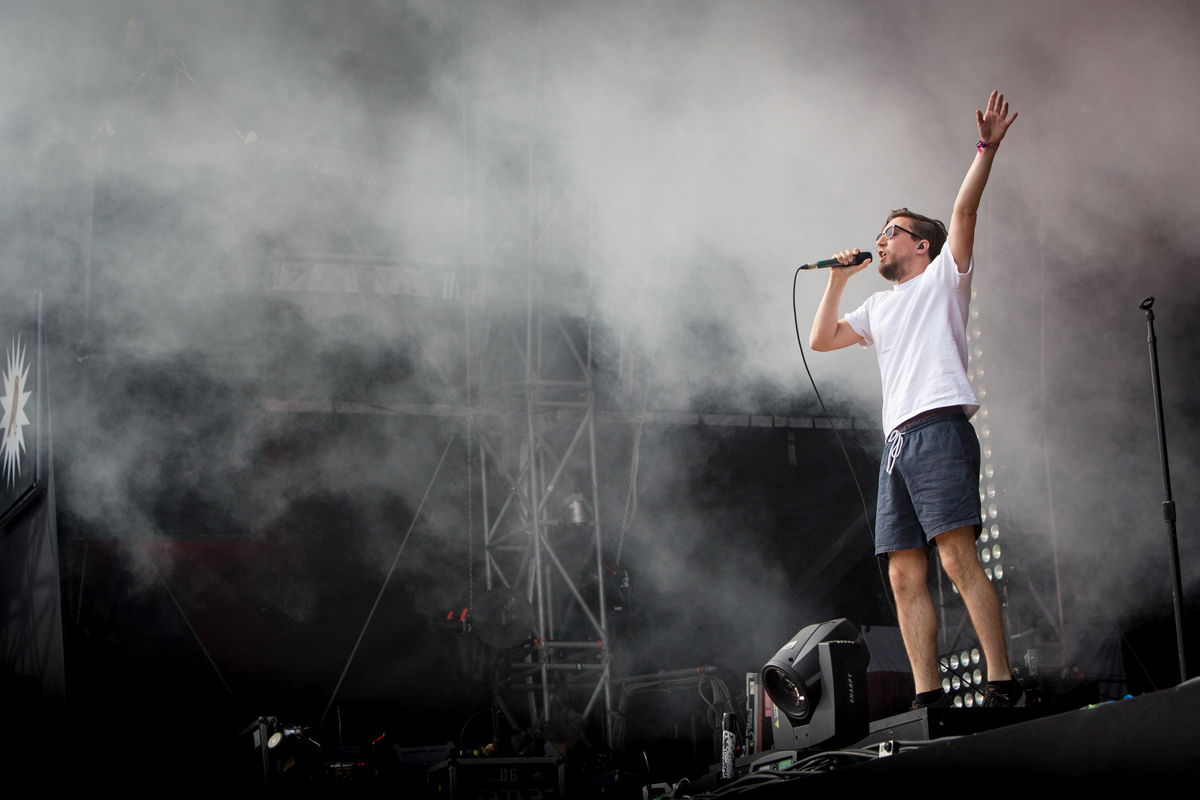 prinz pi | oasg 2014